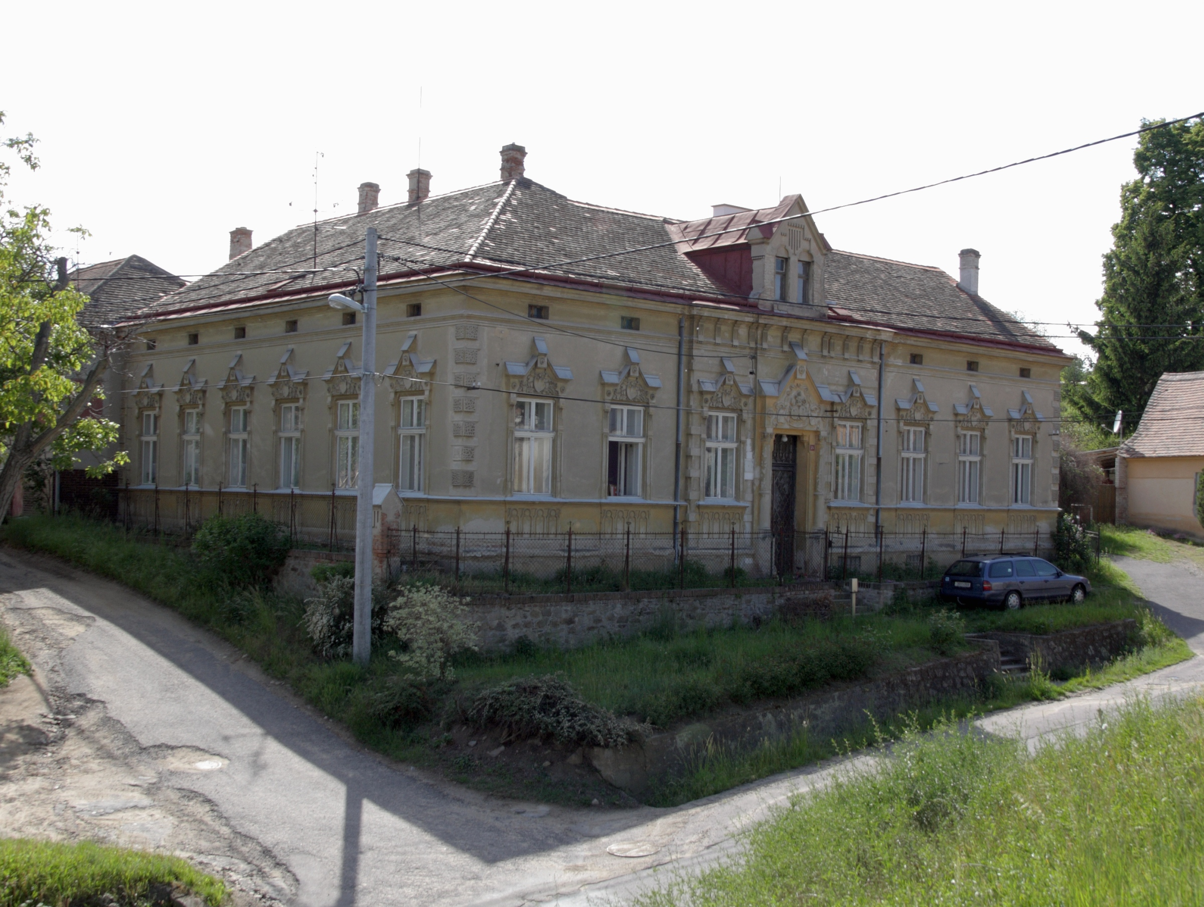 Konice (Znojmo) - fara, čp. 25.